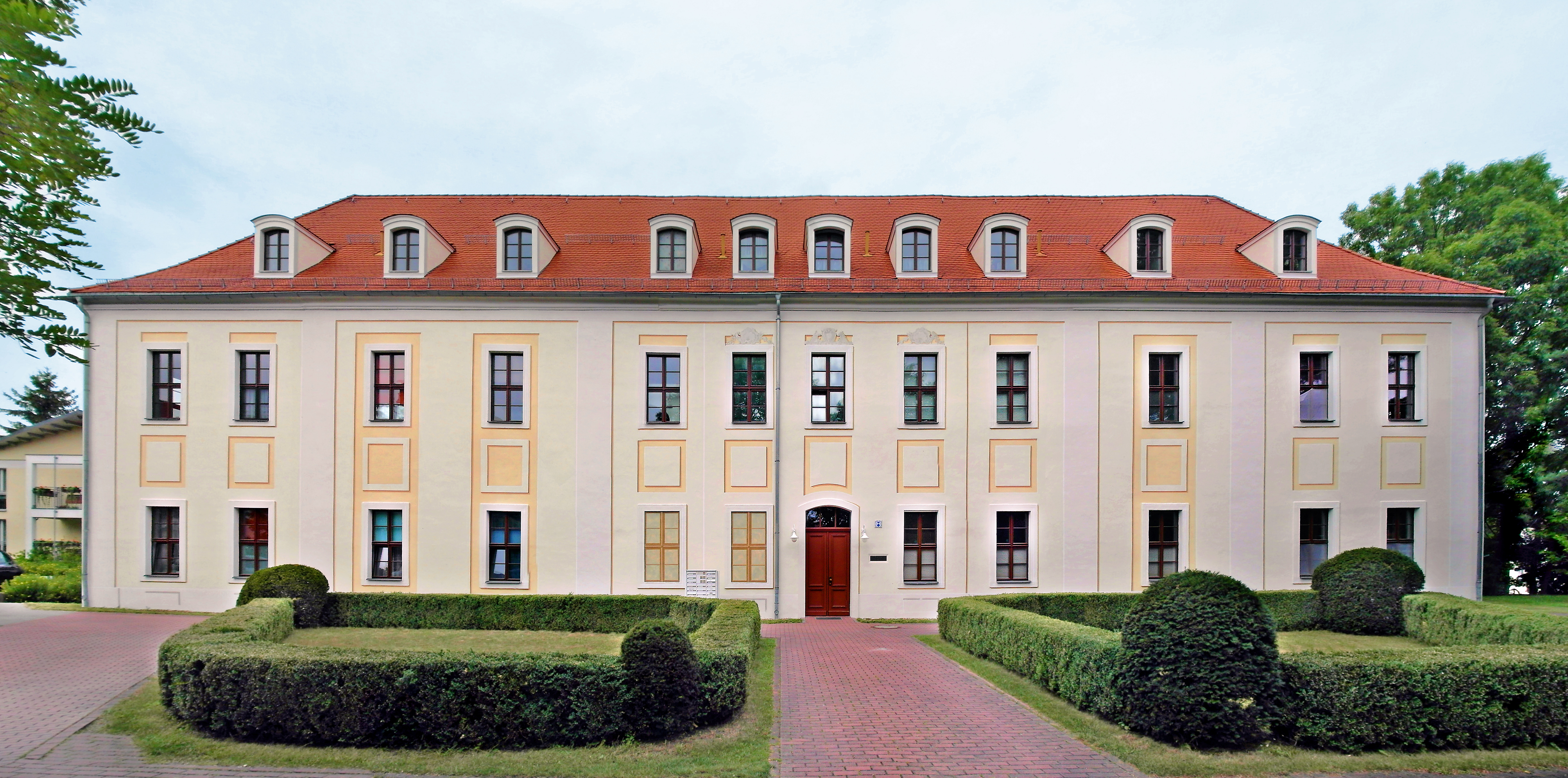 Schloss Wilsdruff (2. H. 17. Jh.), jetzt Mietwohnungen, Zustand 2016.